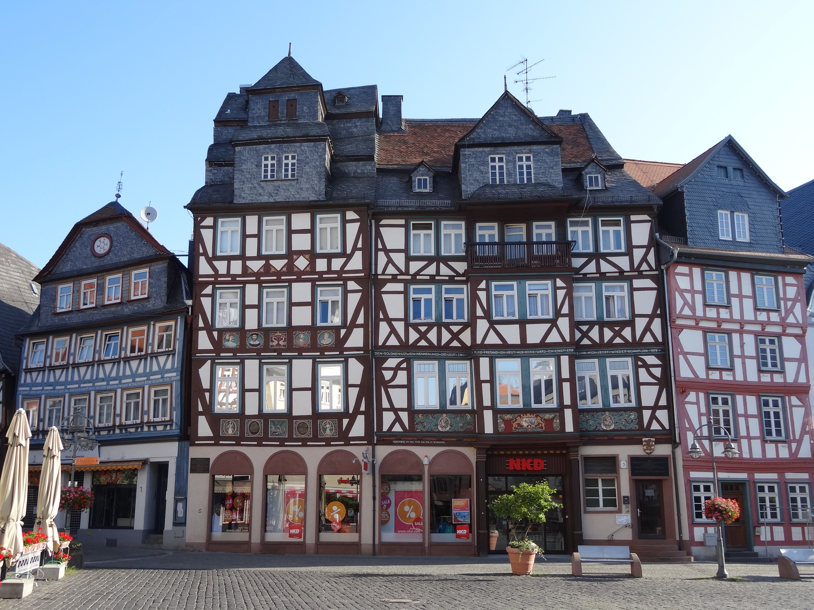 Marktplatz 3 (Butzbach)